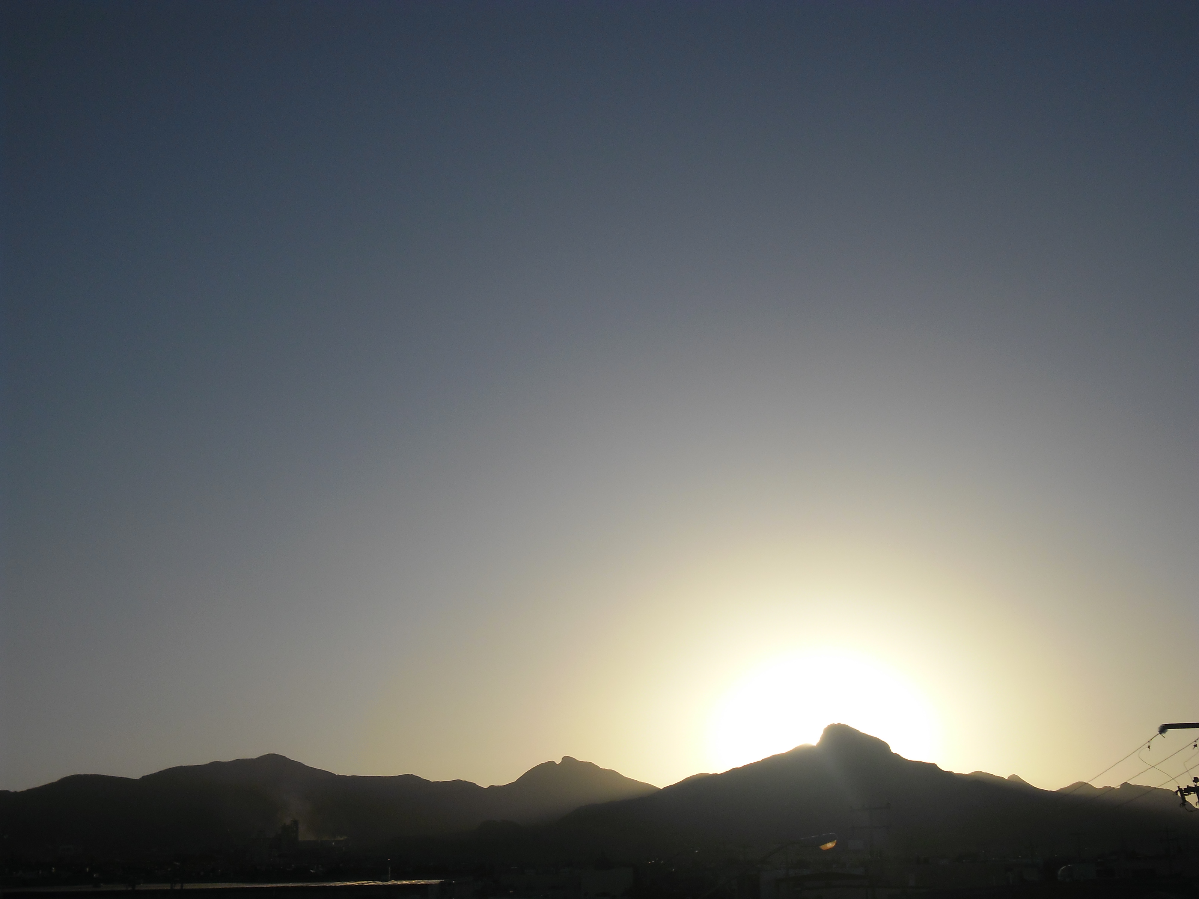 cerros